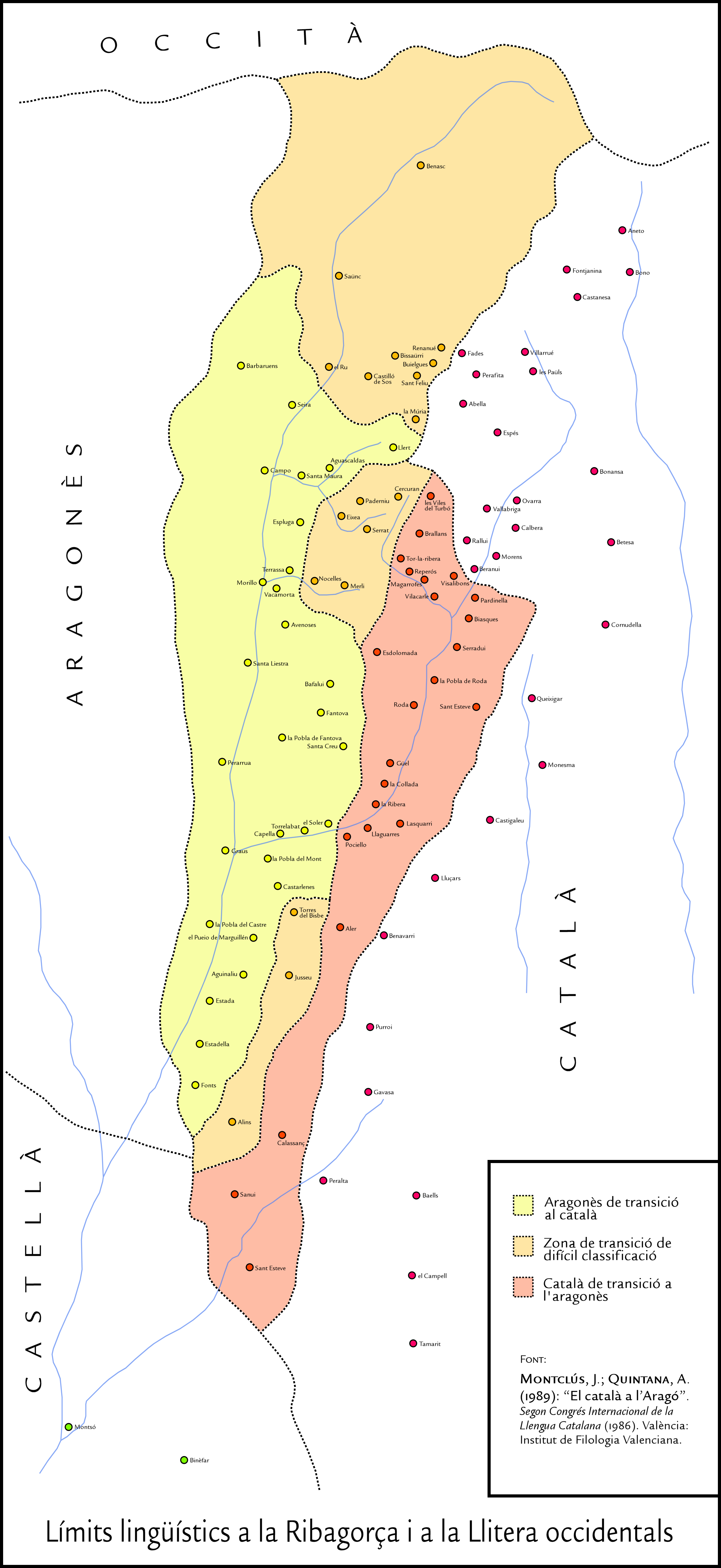 Límits lingüístics a la Ribagorça i a la Llitera occidentals